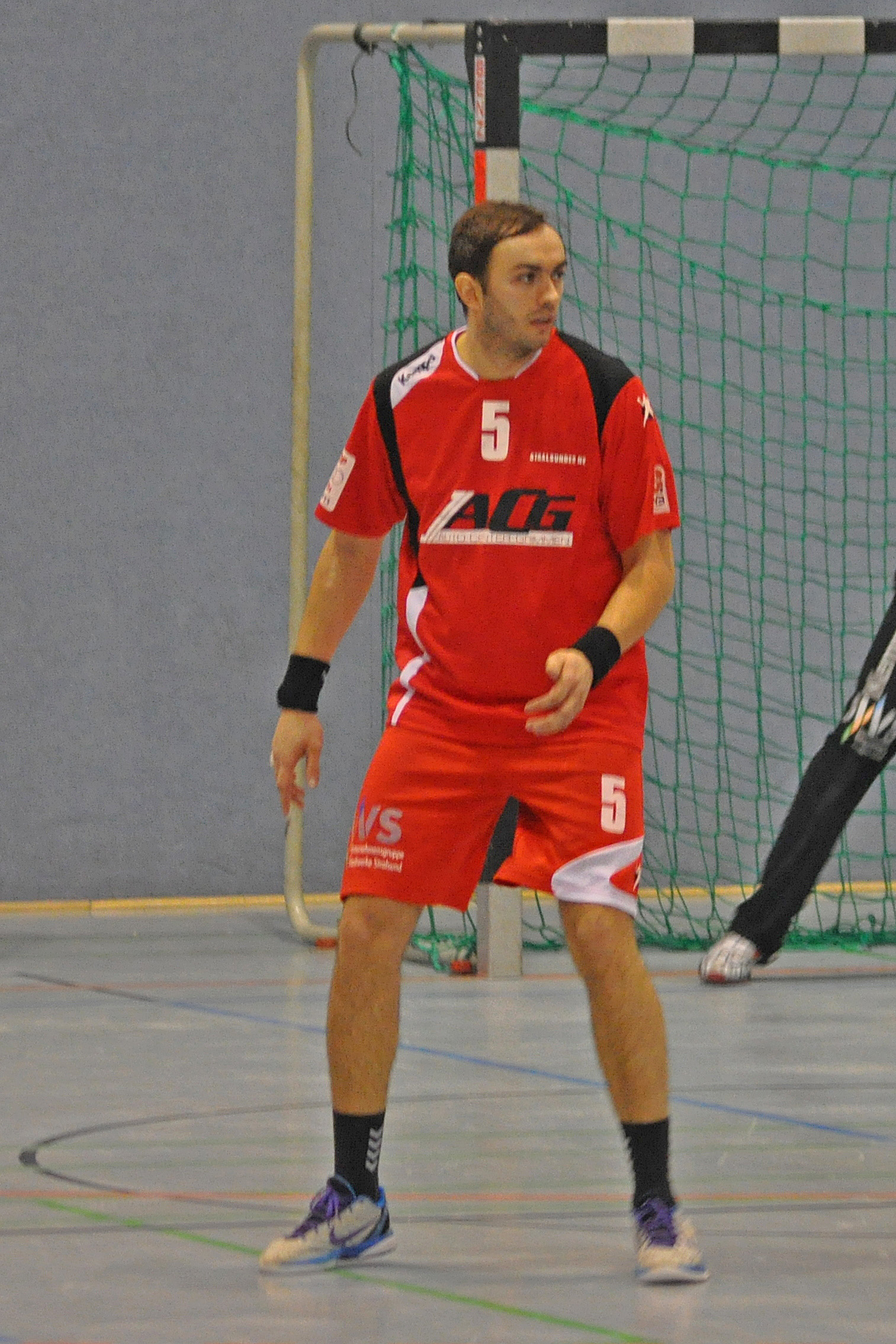 Bild aufgenommen beim Spiel in der 3. Liga (DHB) zwischen dem Stralsunder HV und dem HSV Insel Usedom am 23. März 2013 in der Stralsunder Vogelsanghalle. Das Speil endete 30:29 für den Stralsunder HV.